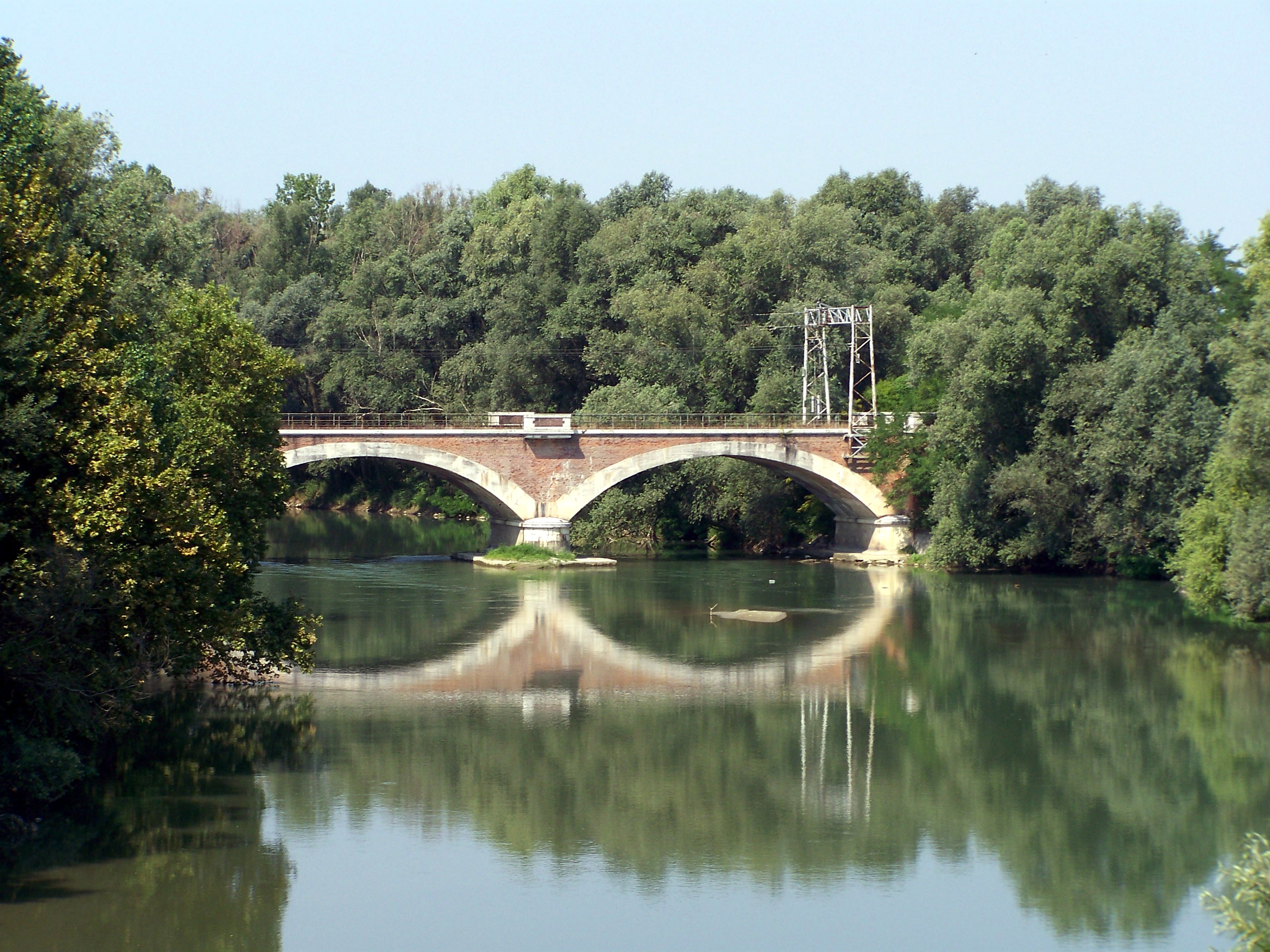 Ponte sul fiume Oglio della Ferrovia Brescia-Cremona presso Robecco d'Oglio.